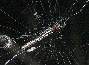 Cyclosa bifida from Australia.